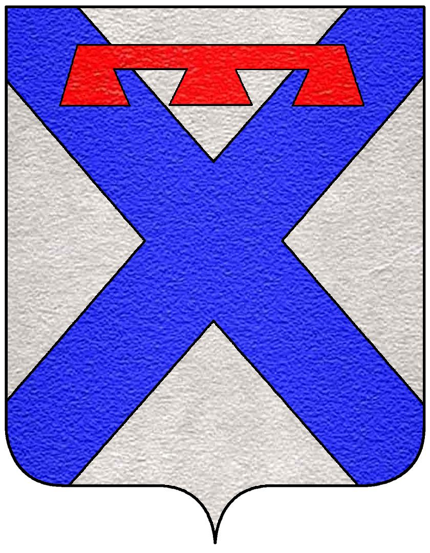 Stemma della famiglia Ridolfi di Ponte